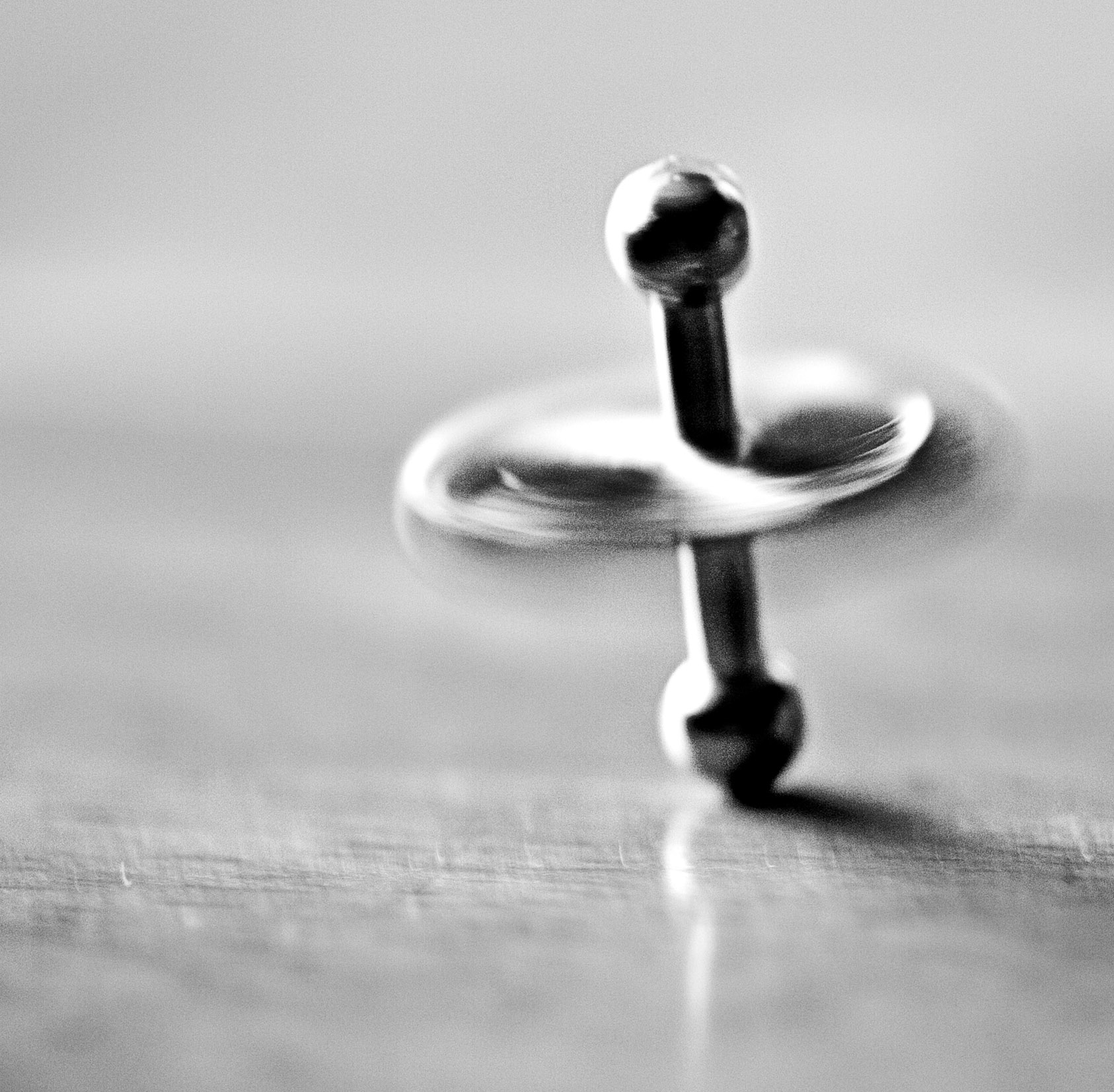 A Top